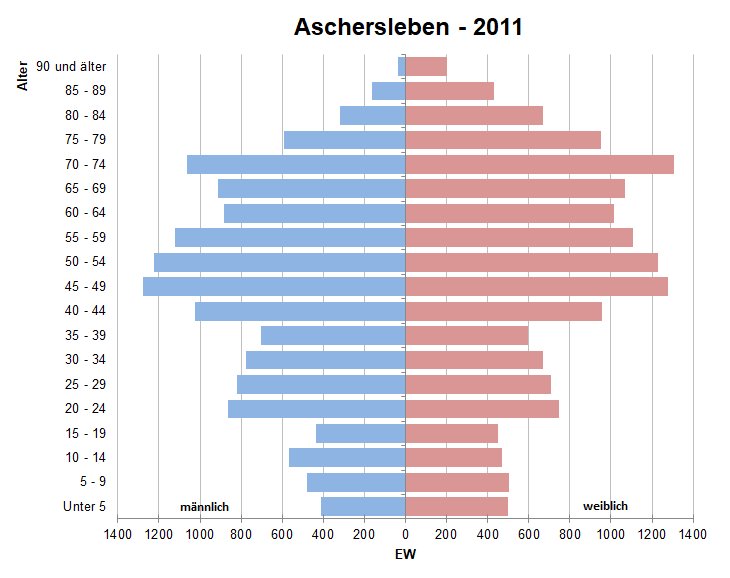 Bevölkerungspyramide der Stadt Aschersleben nach Zensus 2011.